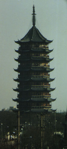 内容介绍：苏州北寺塔 原创者：zhuwq 创作日期：1994年1月，在苏州上学时所摄